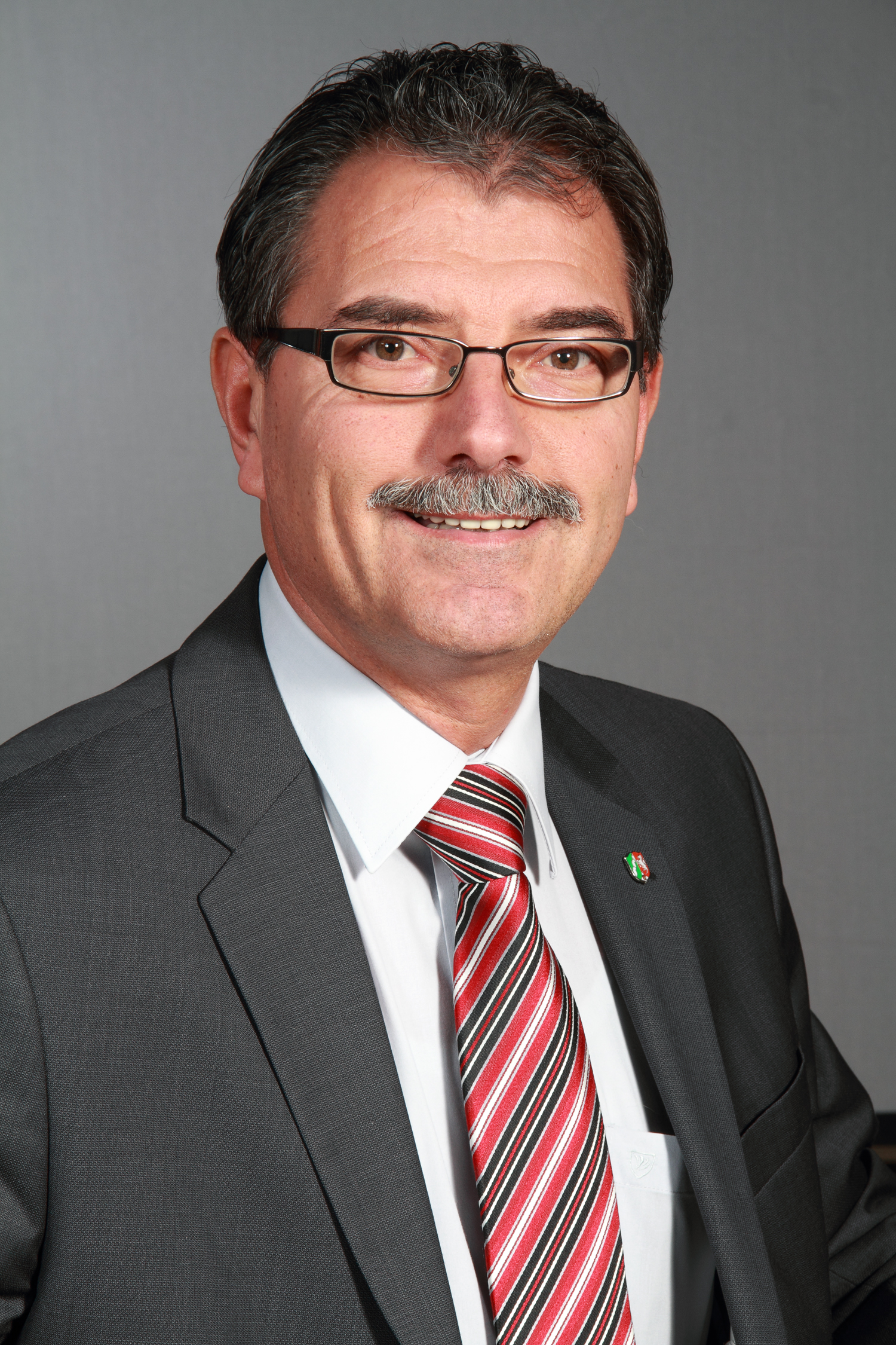 LandtagsabgeordneteR NRW